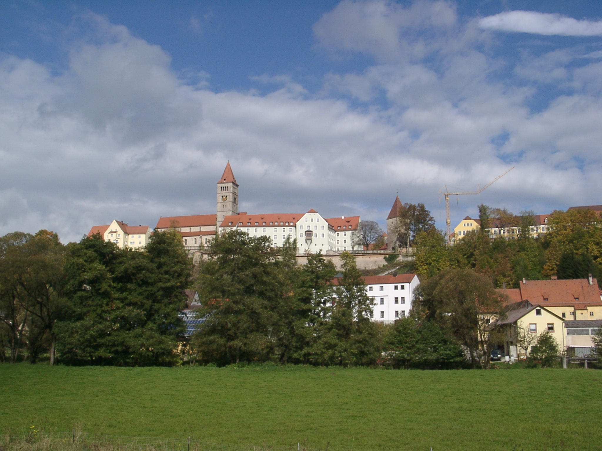 Kloster Kastl